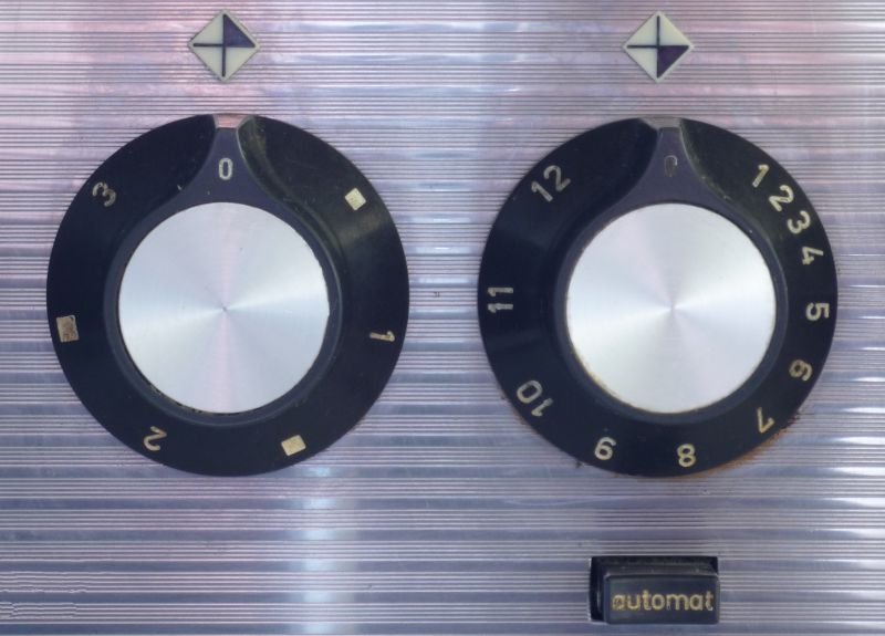 Siebentakt- sowie Regla-Schalter an einem AEG-Elektroherd (Bj. 1971)